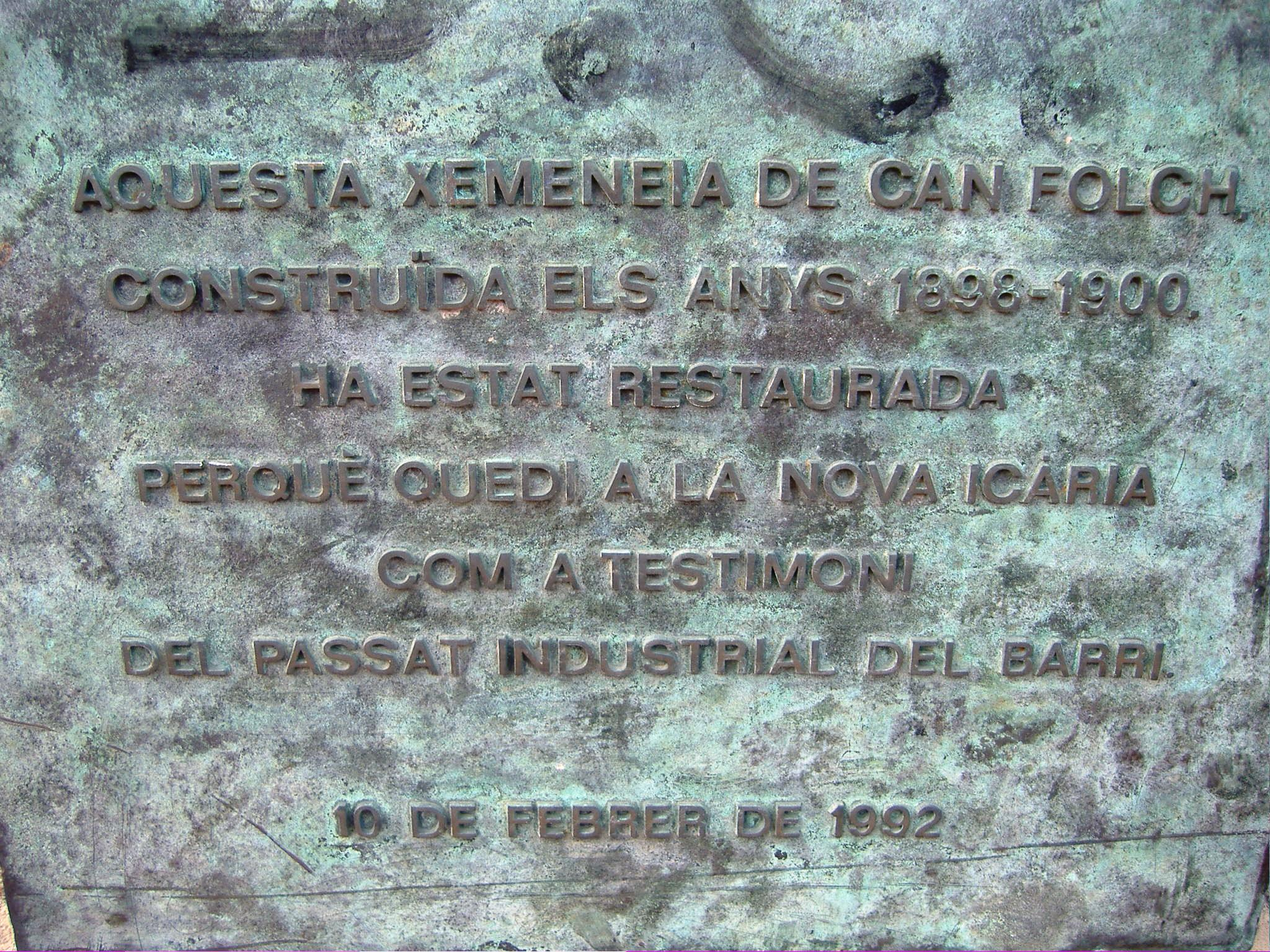 Inscripció commemorativa de la xemeneia de Ca'n Folch a la Vila Olímpica de Barcelona.